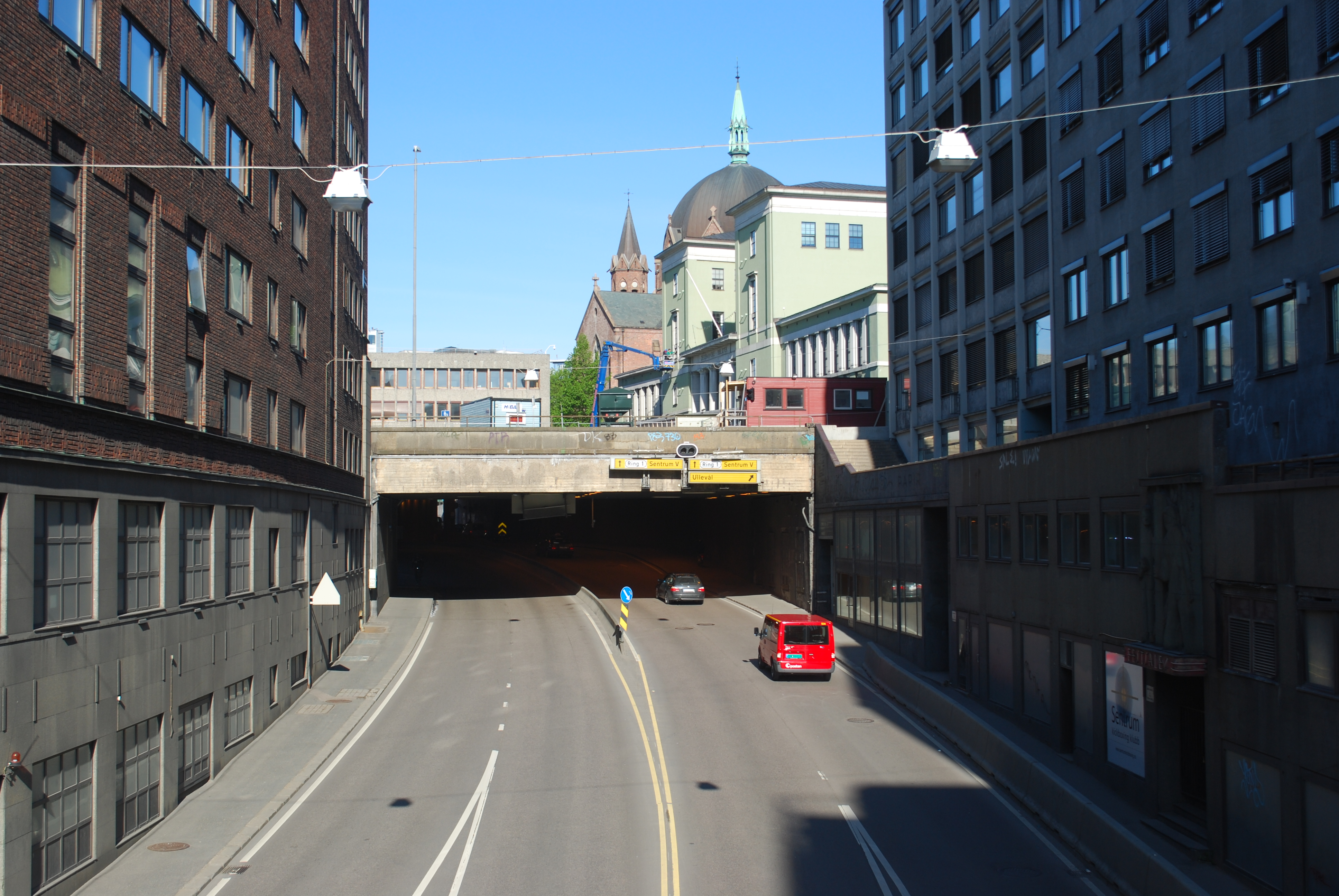 Hammersborggata, Oslo sentrum, sett fra Møllergata til Grubbegata. Hovedbrannstasjonen til venstre, Deichmanske bibliotek og Trefoldighetskirken i bakgrunnen